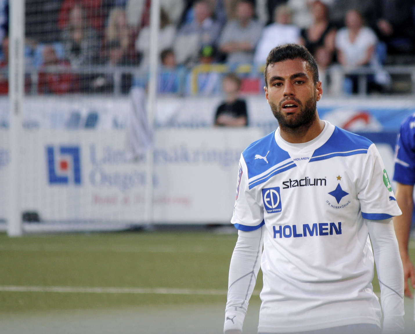 IFK Norrköpings anfallare Imad Khalili under östgötaderbyt 2012 mellan IFK Norrköping och Åtvidabergs FF på Nya Parken. Bilden tagen med en Canon EOS 1000D plus telelinsen 55-250mm